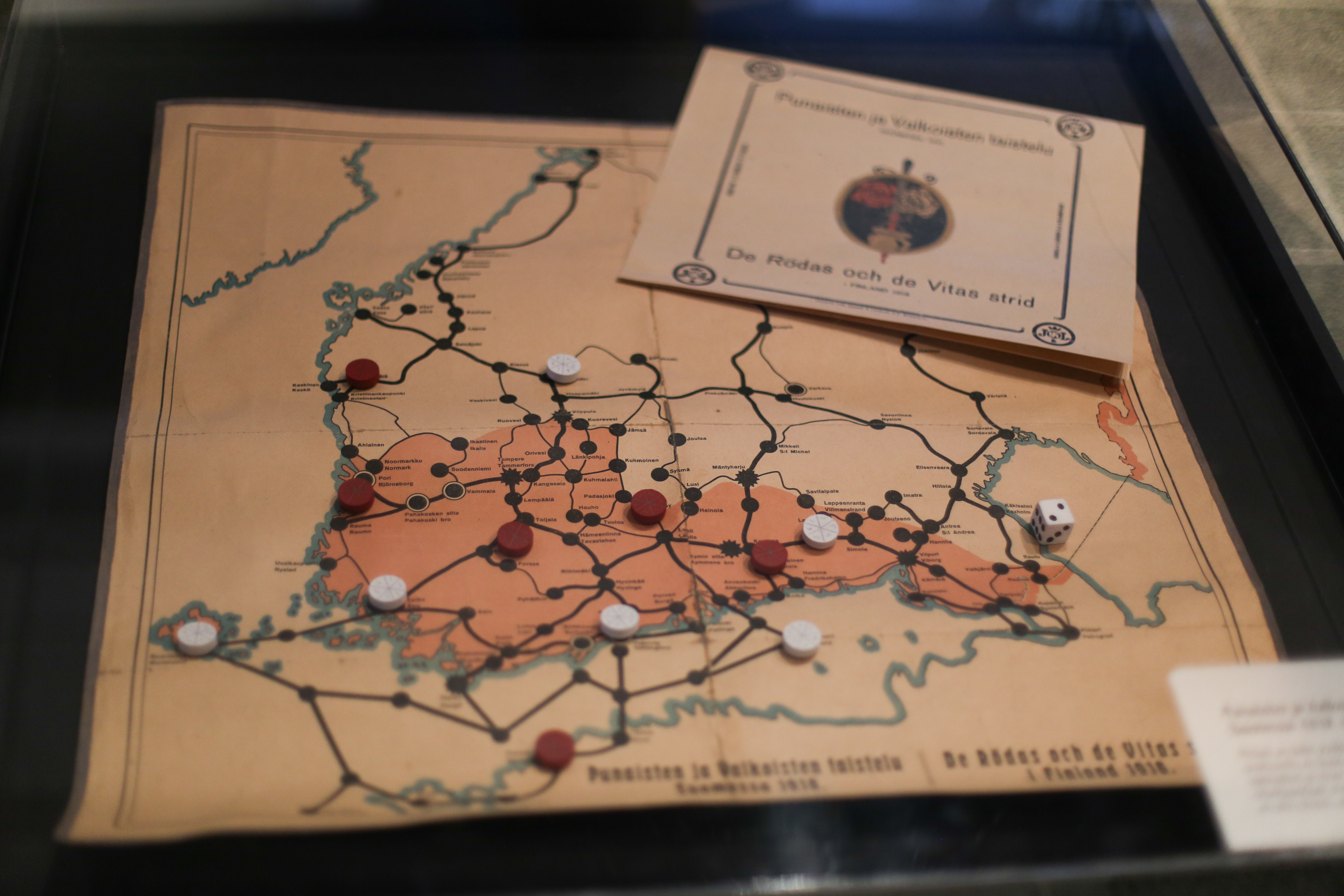 Lautapeli Punaisten ja valkoisten taistelu Suomessa 1918